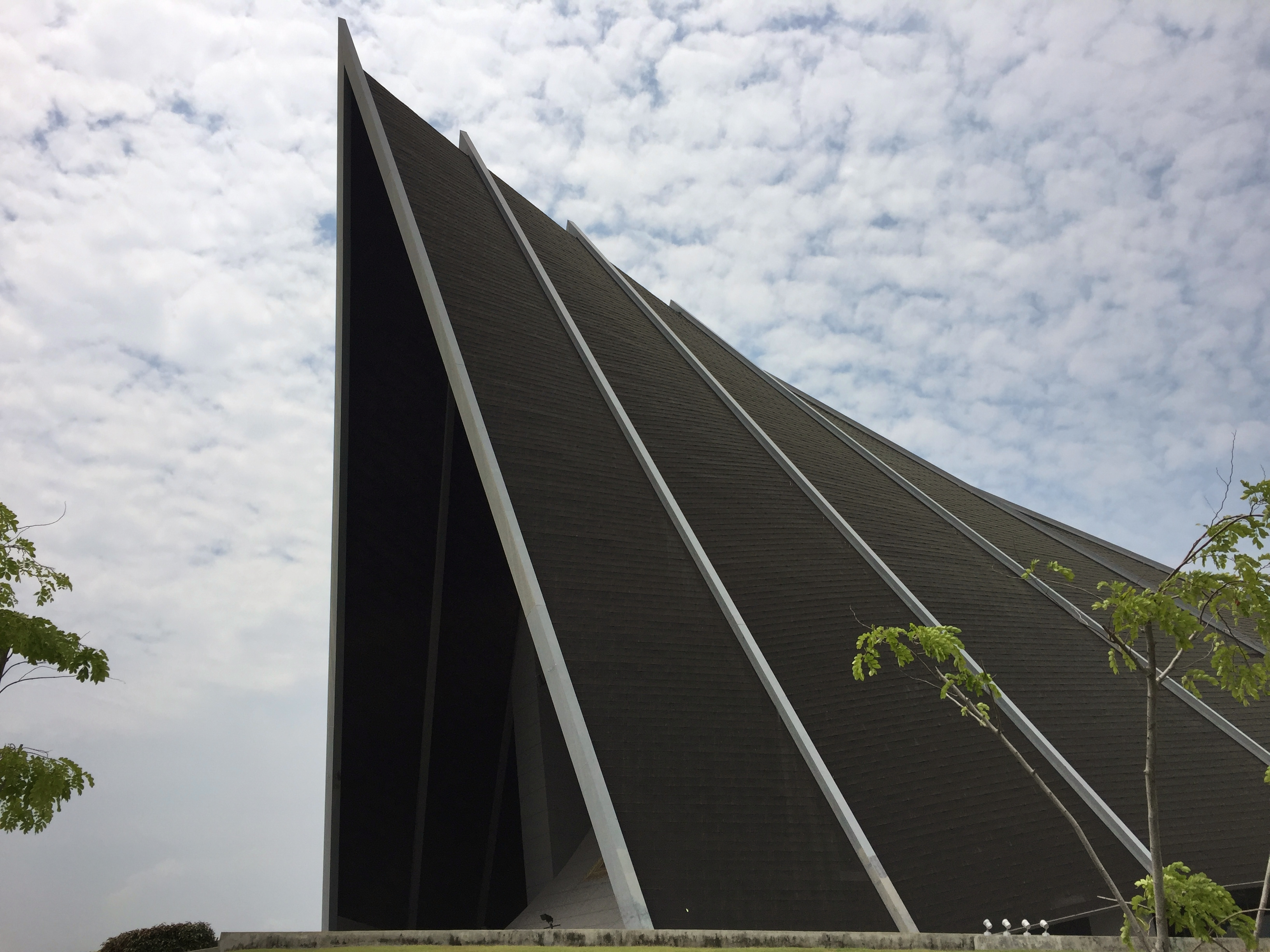 ด้านทิศใต้ของมหิดลสิทธาคารหันหน้าสู่ถนนบรมราชชนนี โดยด้านทิศใต้นี้หลังคาของอาคารถูกออกแบบให้ลดระดับลงจนเป็นหน้าจั่วขนาดใหญ่